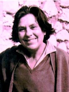 L'archeologa Halet Çambel